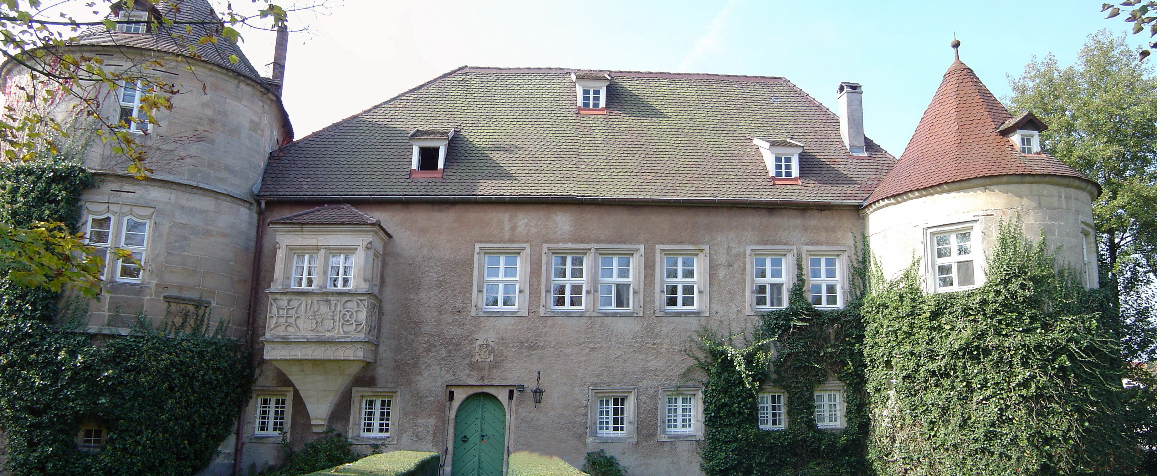 Haag, Schloss Unternschreez, Denkmal Nr. D-4-72-146-7